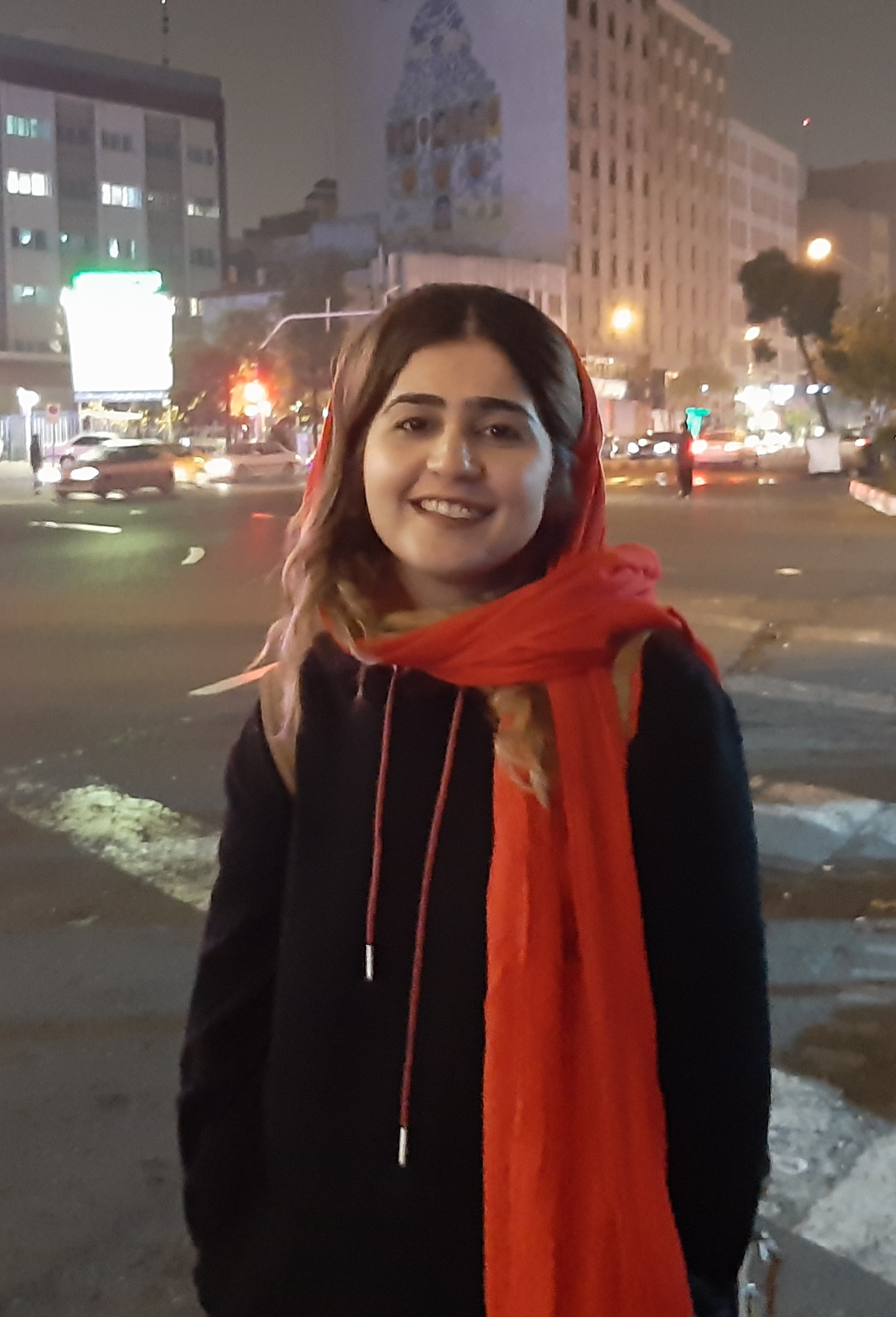 سپیده قلیان